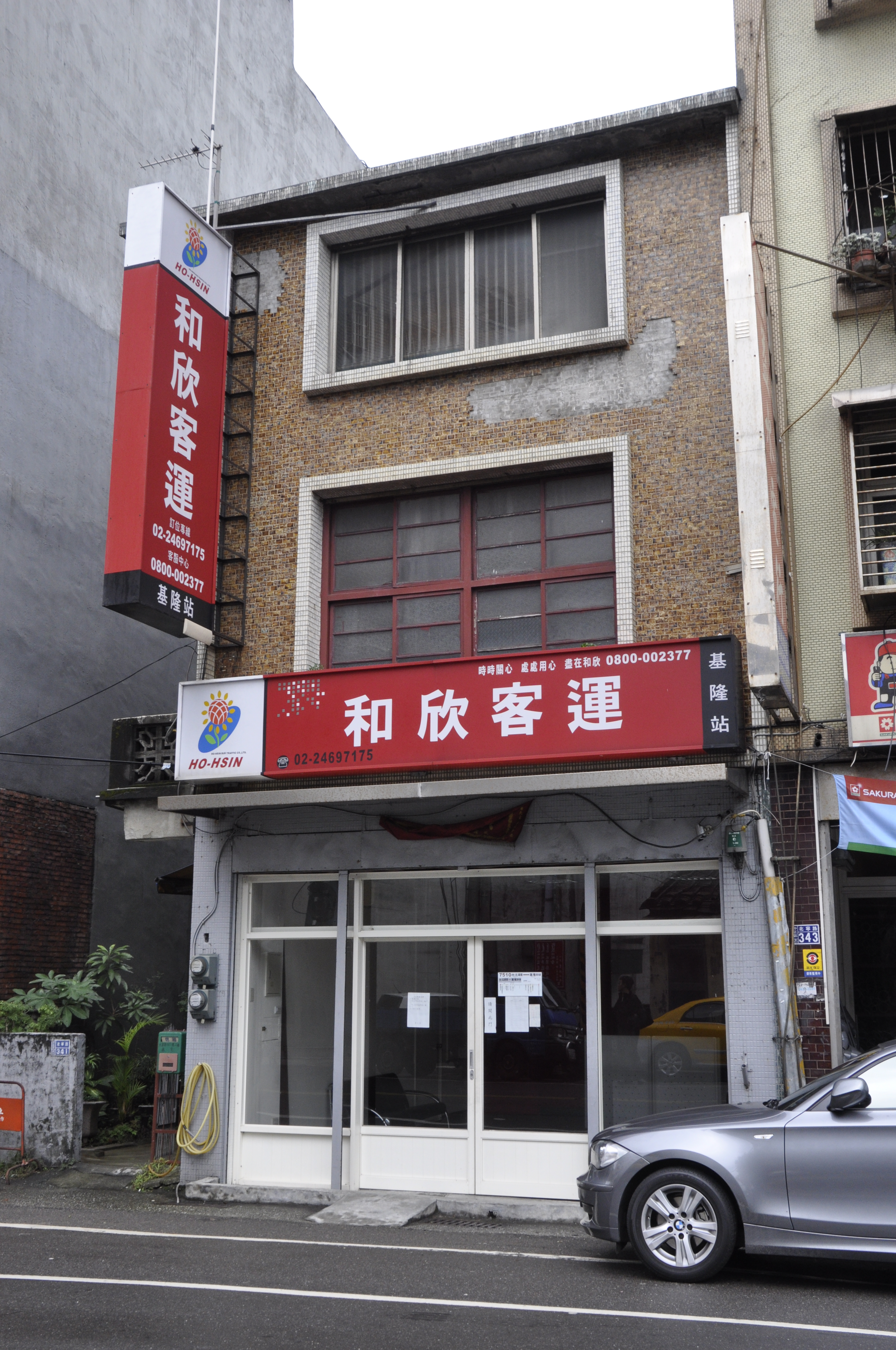 中文（台灣）: 和欣客運基隆站，地址：基隆市中正區北寧路341號。